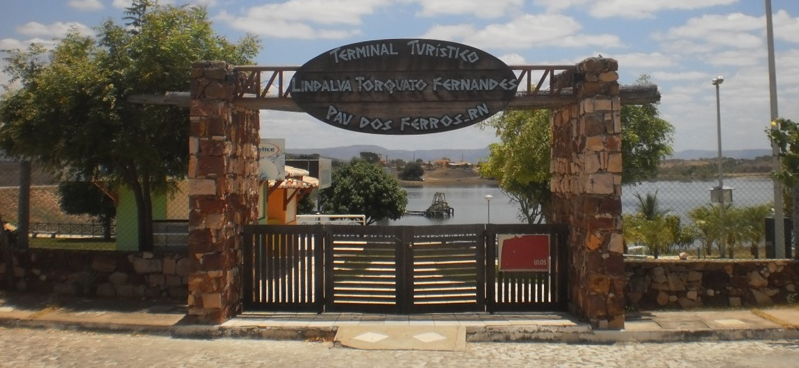 Terminal Turístico Lindalva Torquato em Pau dos Ferros (RN)